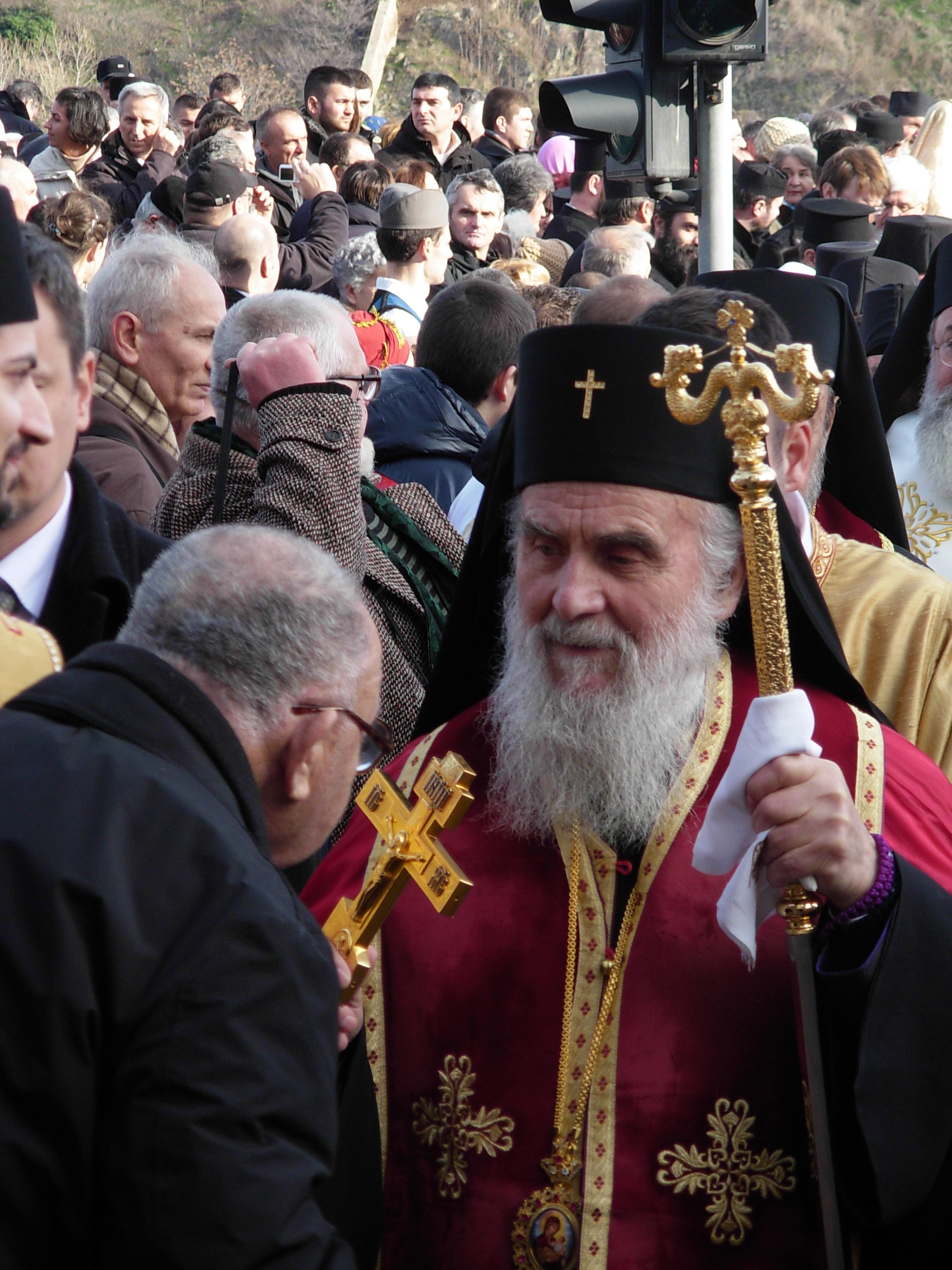 Patrijarh Irinej na obeležavanju 70. godišnjice Novosadske racije.